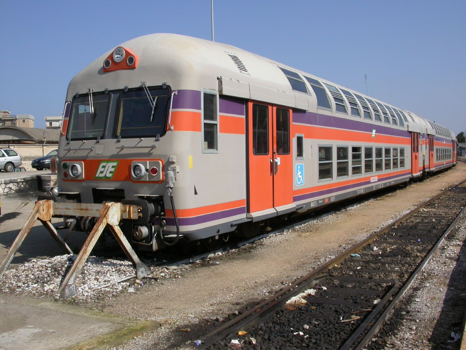 Příměstský vlak na nádraží Bari Sud Est